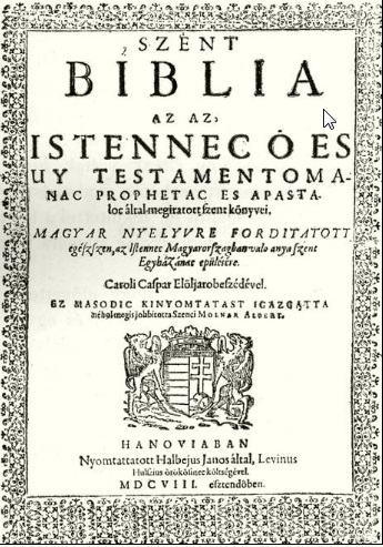 A Szenczi Molnár Albert által kiadott Hanaui Biblia (1608) címlapja